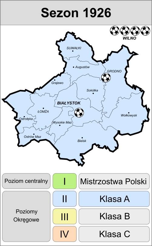 Jagiellonia w sezonie 1926 - mapa